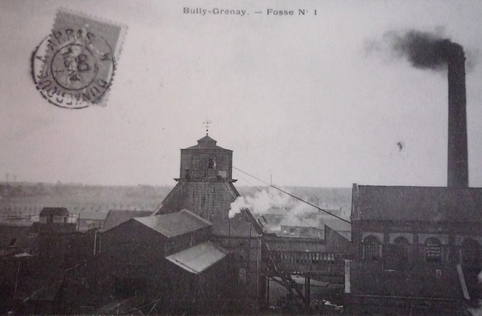 La Fosse n° 1 - 1 bis - 1 ter de la Compagnie des mines de Béthune était un charbonnage constitué de trois puits situé à Bully-les-Mines, Pas-de-Calais, Nord-Pas-de-Calais, France.